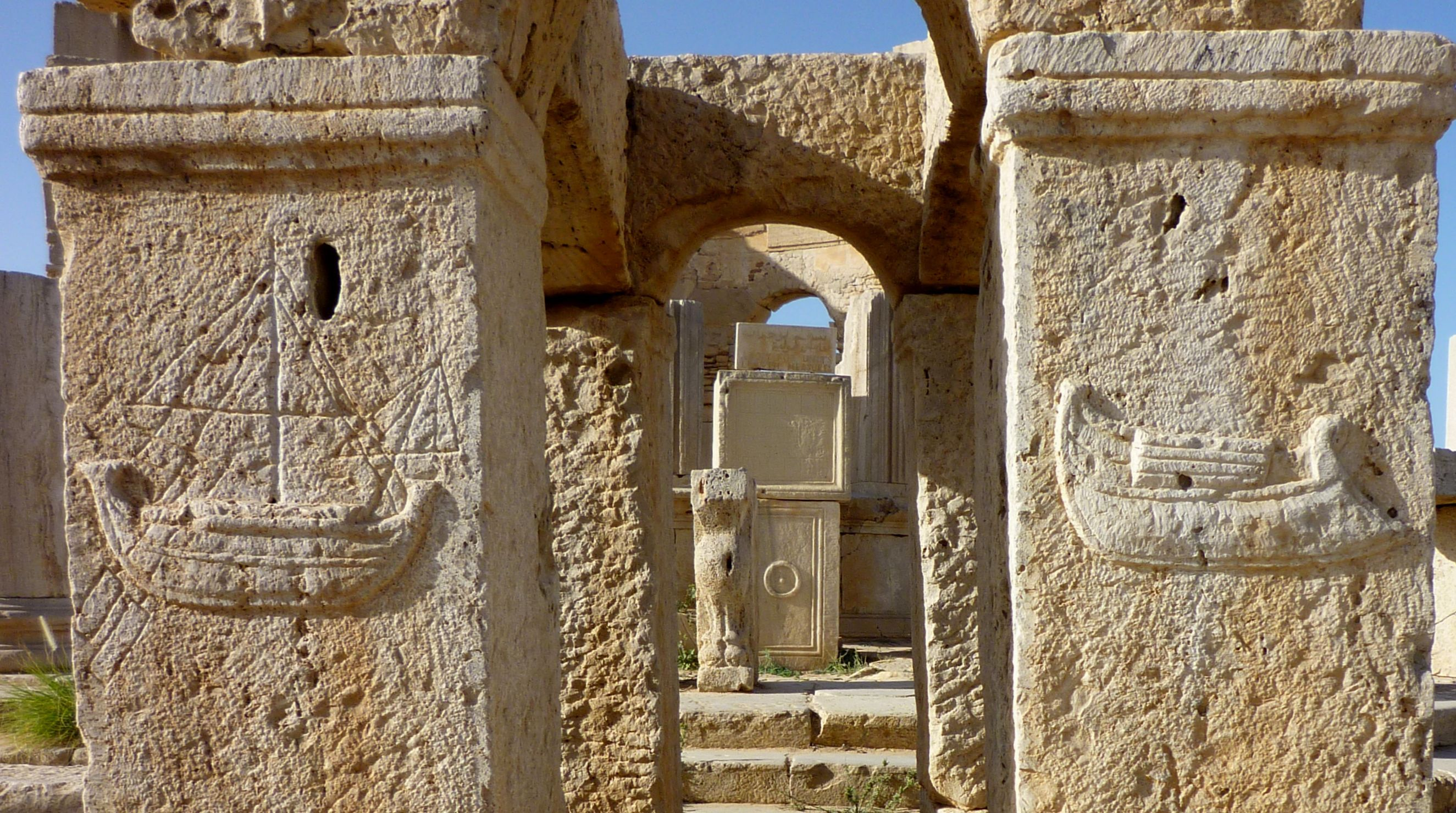 Leptis Magna - Am Marktplatz, Relief Römisches Schiff links, Punisches Schiff rechts